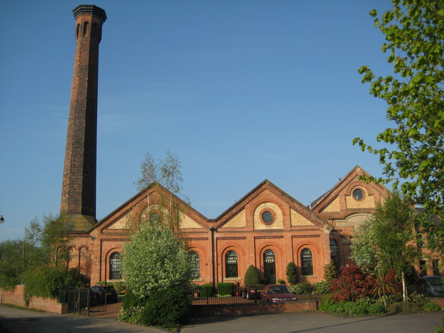 Powick Mill